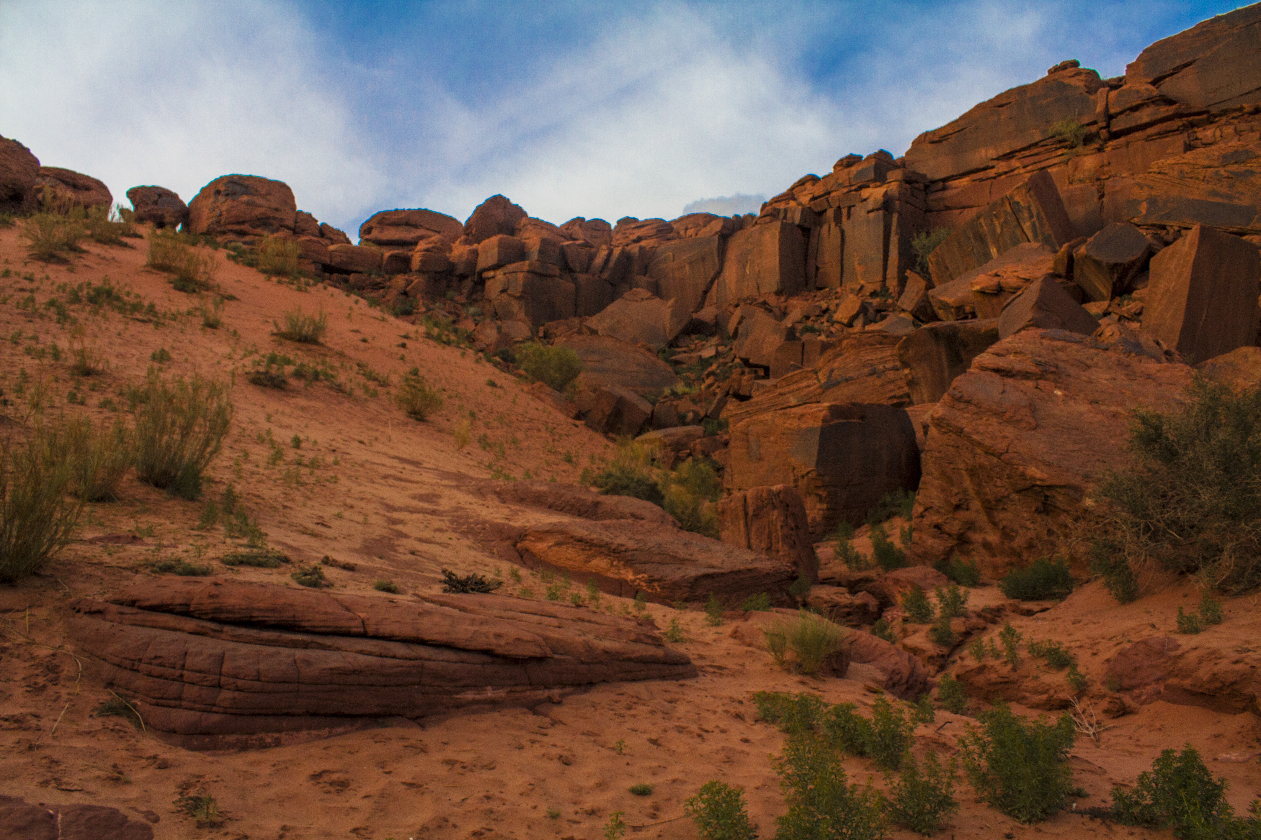 la montagne de smail laouedj situé a la région de tiout à wilaya du naama en Algérie